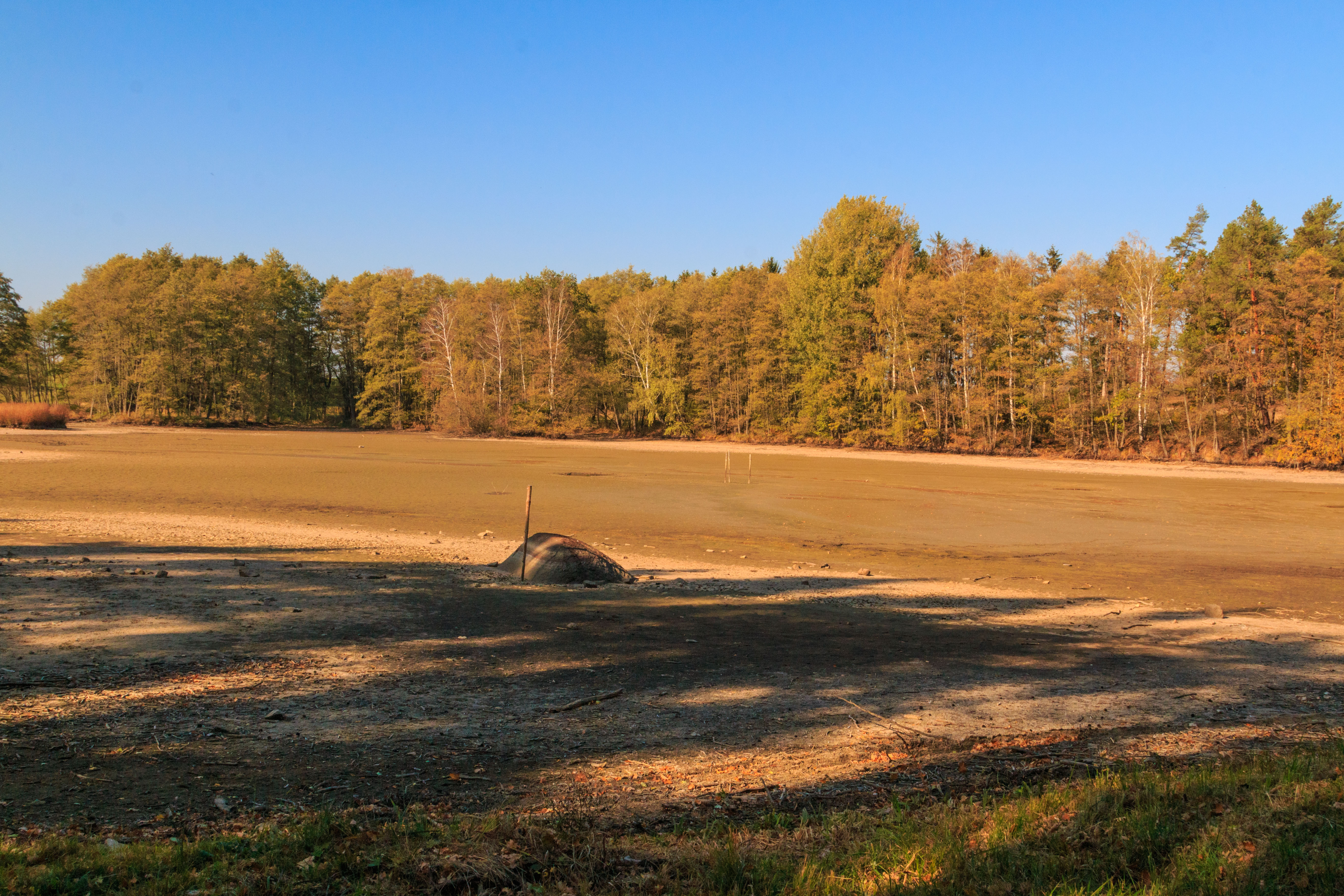 Poplužský rybník u Žumberku Project: Vodstvo Ticket: 1617.